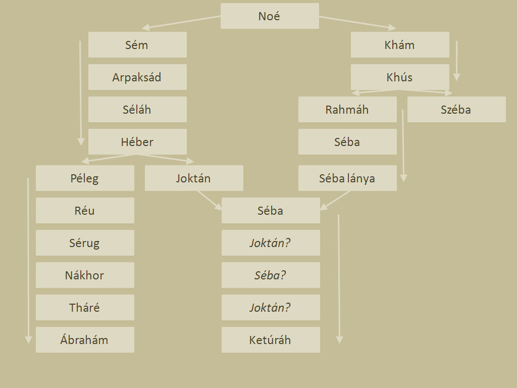 Ketúráh származása a Teremtés könyve alapján